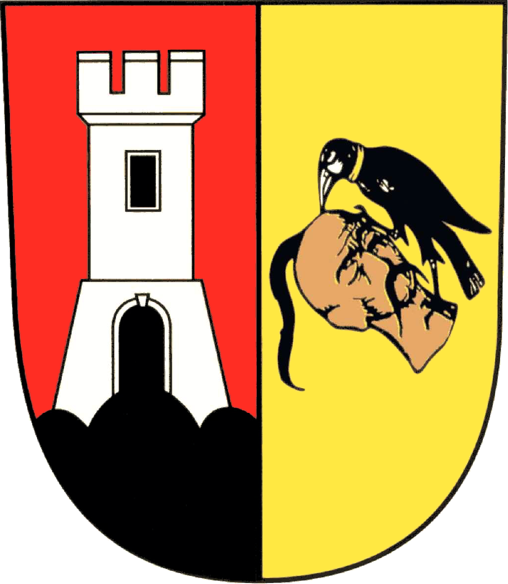 Znak vesnice Orlík nad Vltavou